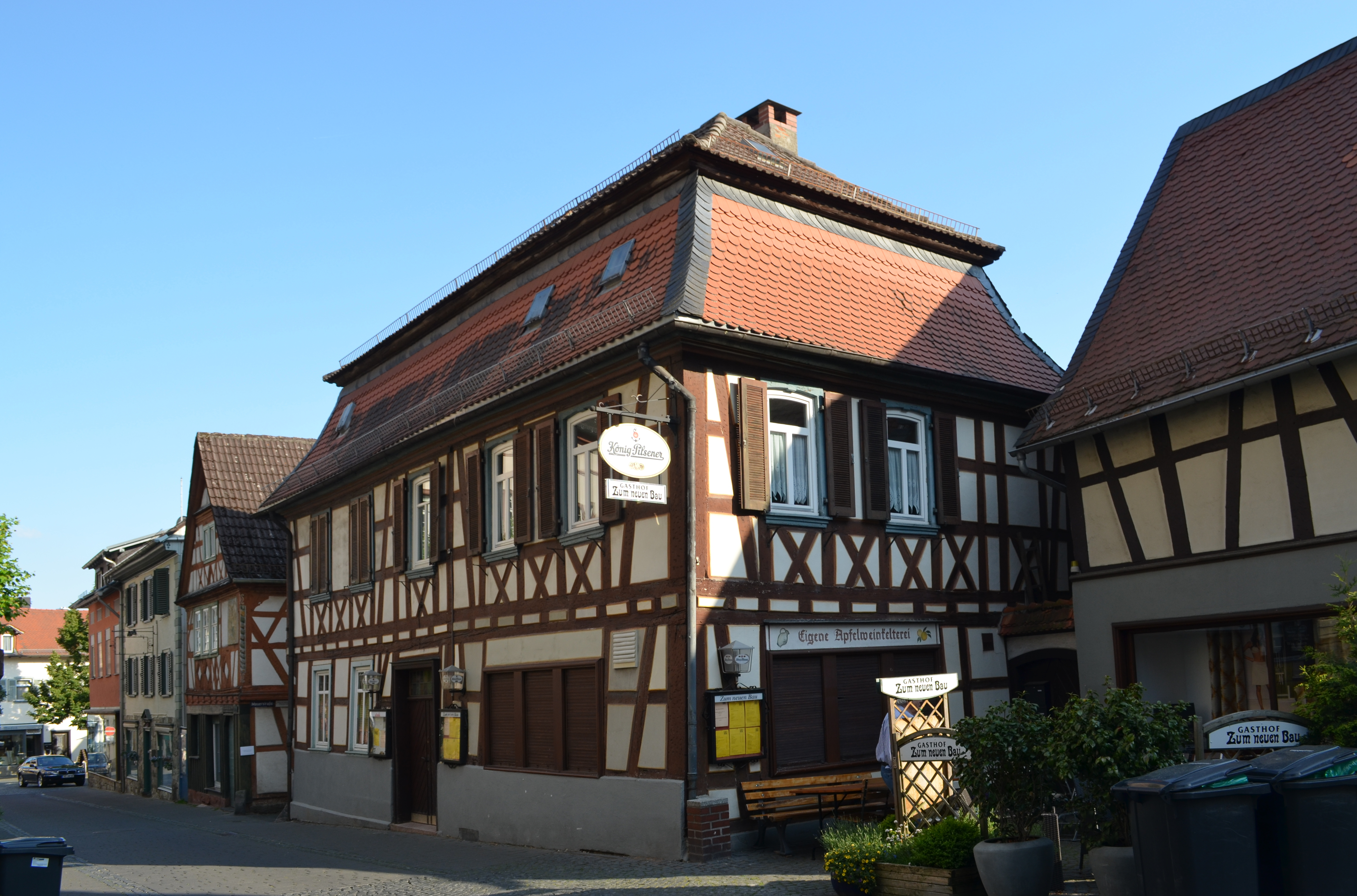 Kronberg, Friedrich-Ebert-Straße 29